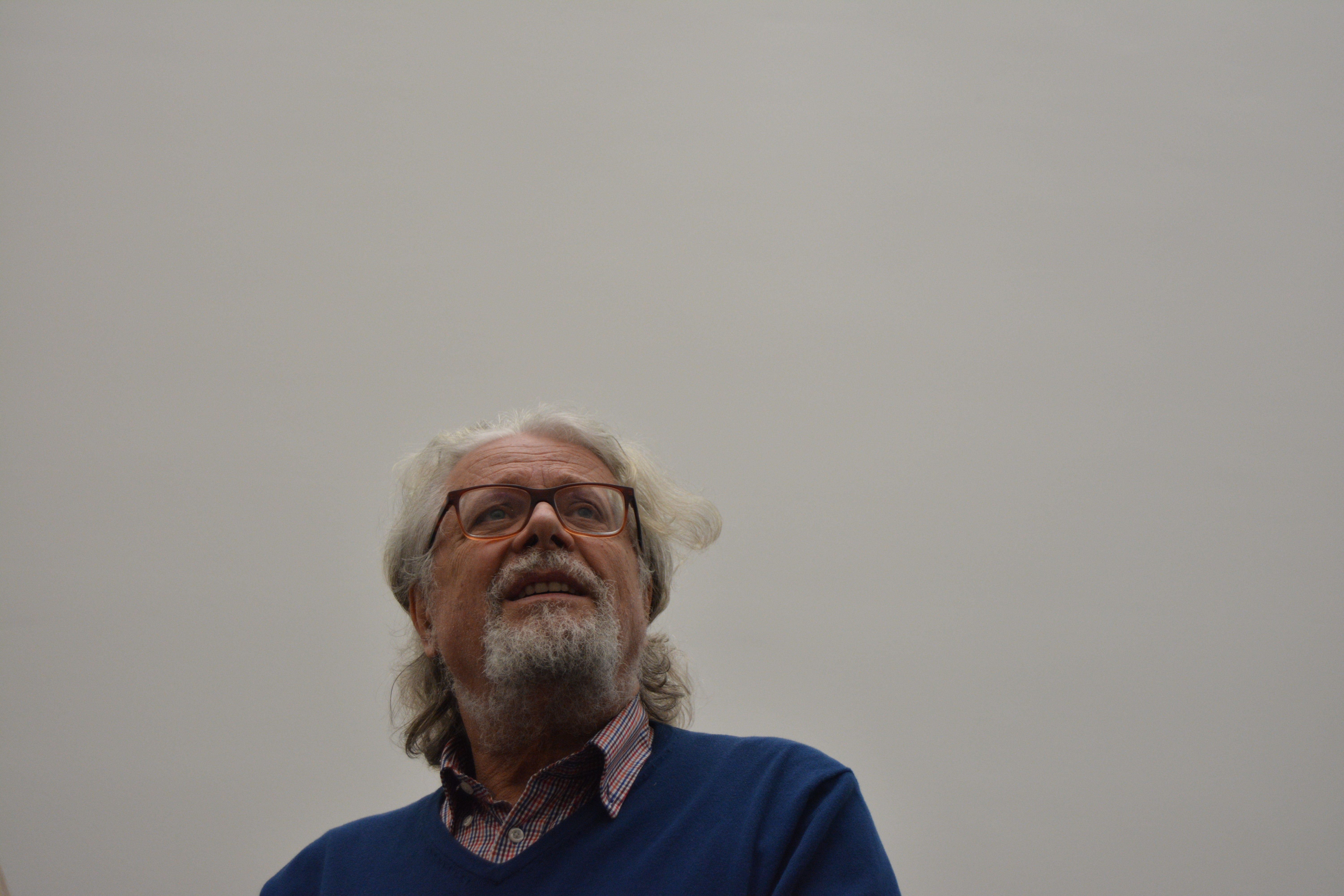 Foto Václava Vokolka